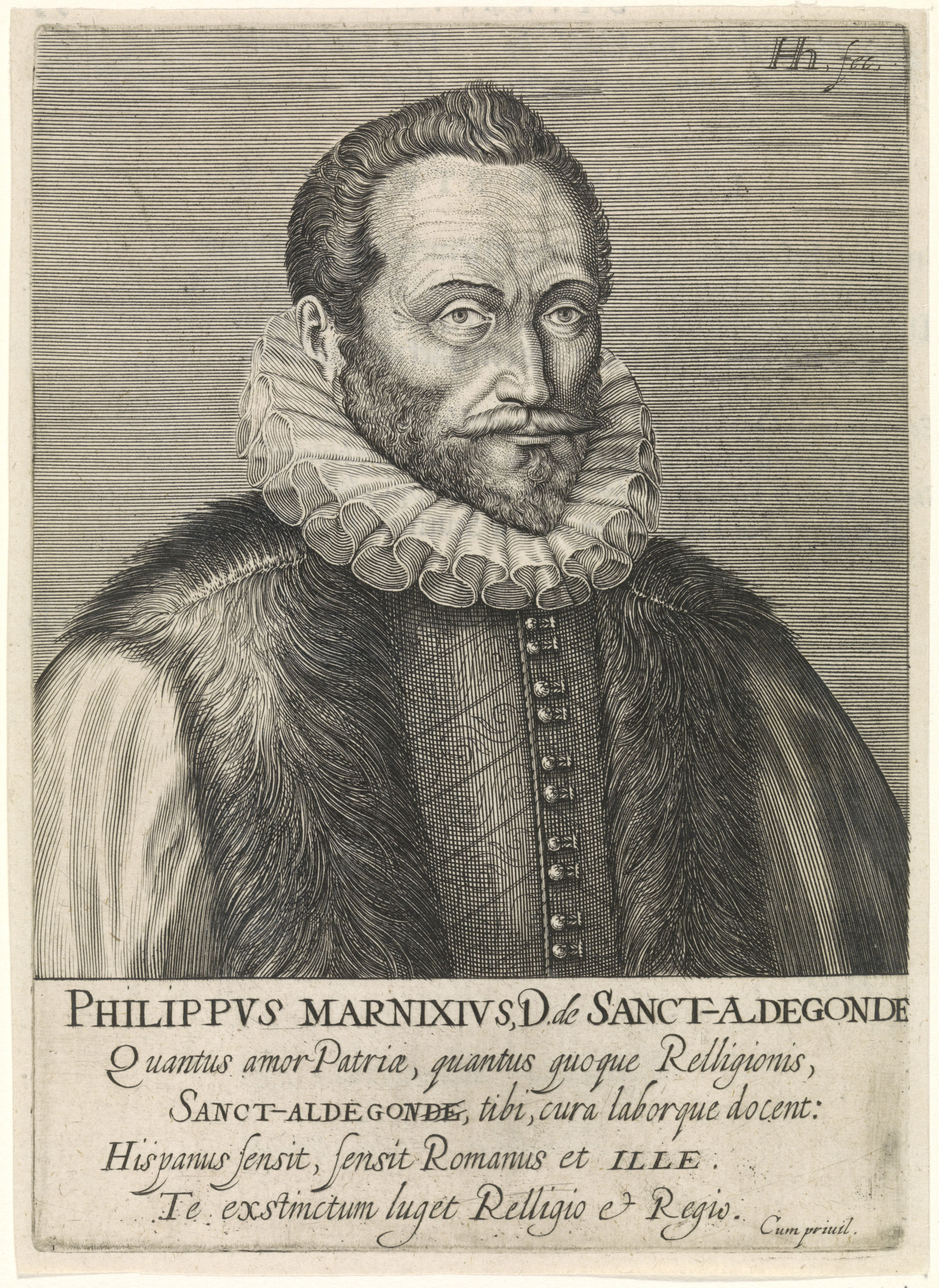 IdentificatieTitel(s): Portret van Filips van Marnix, heer van Sint-AldegondeBeroemde hervormers (serietitel)Icones virorum nostra patrumq. memoria illustrium (serietitel)Objecttype: prent boekillustratie Objectnummer: RP-P-1937-1575Catalogusreferentie: New Hollstein Dutch 191Hollstein Dutch 159Hollstein Dutch 76FMP 3447-cVan Someren 3499Opschriften / Merken: verzamelaarsmerk, verso, gestempeld: Lugt 2228verzamelaarsmerk, verso, gestempeld: Lugt 2760Omschrijving: Buste naar rechts van Filips van Marnix, heer van Sint-Aldegonde. Onder het portret zijn naam en vier regels in het Latijn. Prent uit (deel 1 van) de serie portretten van beroemde hervormers.VervaardigingVervaardiger: prentmaker: Hendrick Hondius (I) (vermeld op object)verlener van privilege: Staten-Generaal (vermeld op object)Plaats vervaardiging: Den HaagDatering: 1599Fysieke kenmerken: gravure; boekdruk versoMateriaal: papier Techniek: graveren (drukprocedé) / boekdrukAfmetingen: plaatrand: h 167 mm × b 120 mmToelichtingPrent ook gebruikt als boekillustratie in: Jacob Verheiden, Præstantium aliquot theologorum, qui rom. antichristum præcipuè oppugnarunt, effigies. Den Haag: Hendrick Hondius I en Den Haag: B.C. Nieulandt, 1602-1603. Tevens: Arnhem, J.Janssen, 1604.OnderwerpWie: Filips van Marnix van Sint-AldegondeVerwerving en rechtenCredit line: Legaat van de heer F.G. Waller, AmsterdamVerwerving: legaat 1937Copyright: Publiek domein